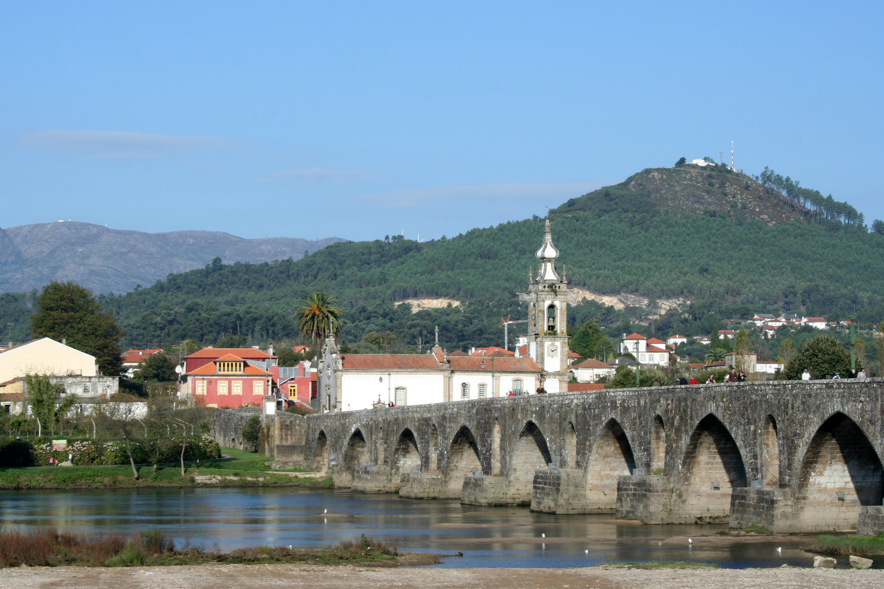 Ponte sobre o Lima